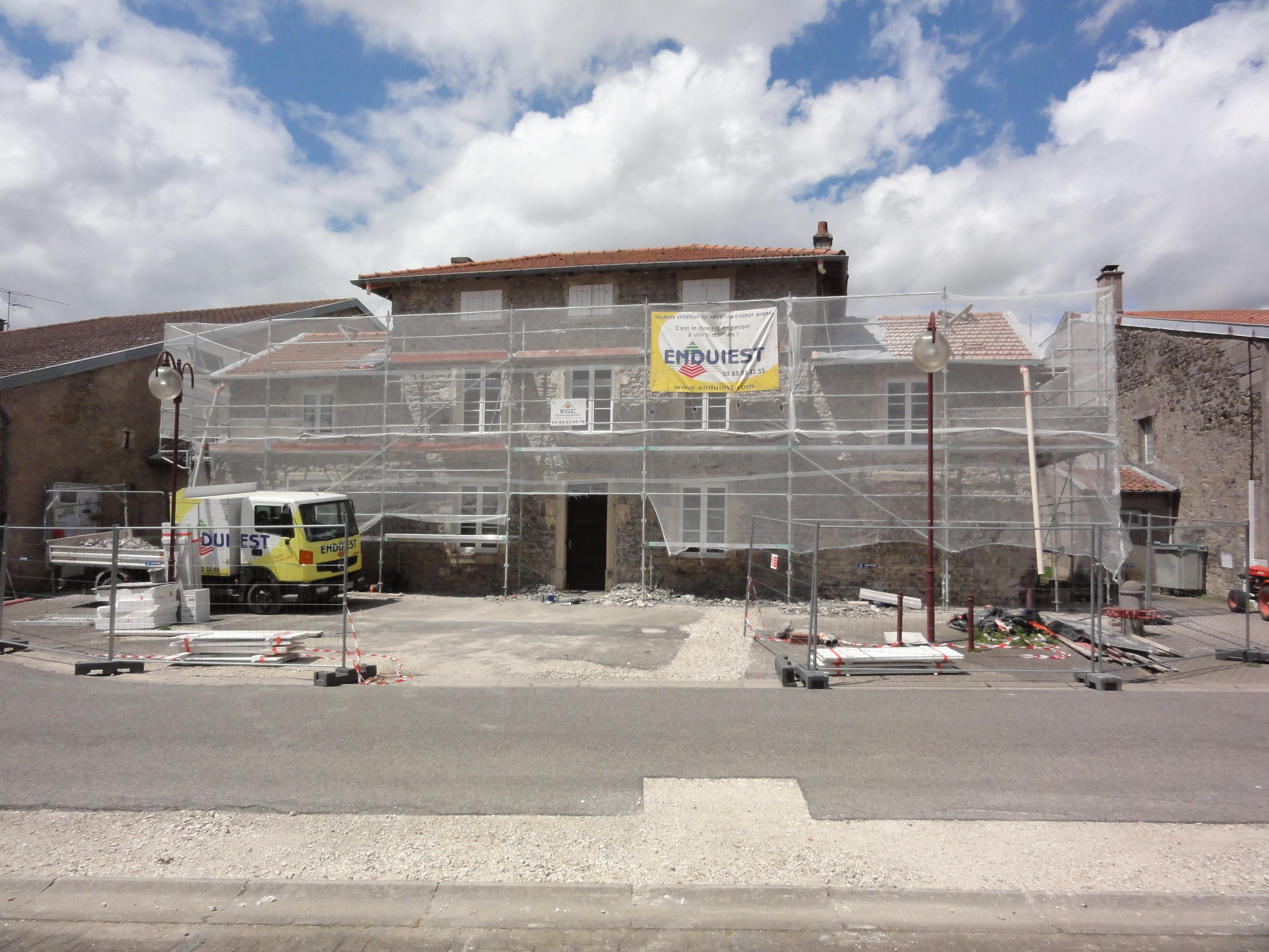 Azelot (M-et-M) mairie en travaux, 2016